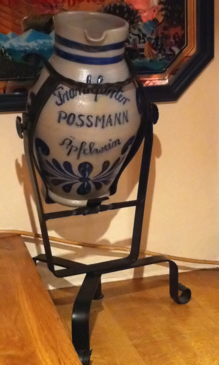 Ein Bembel im Faulenzer; Dekoration auf der Theke einer deutschen Gastwirtschaft